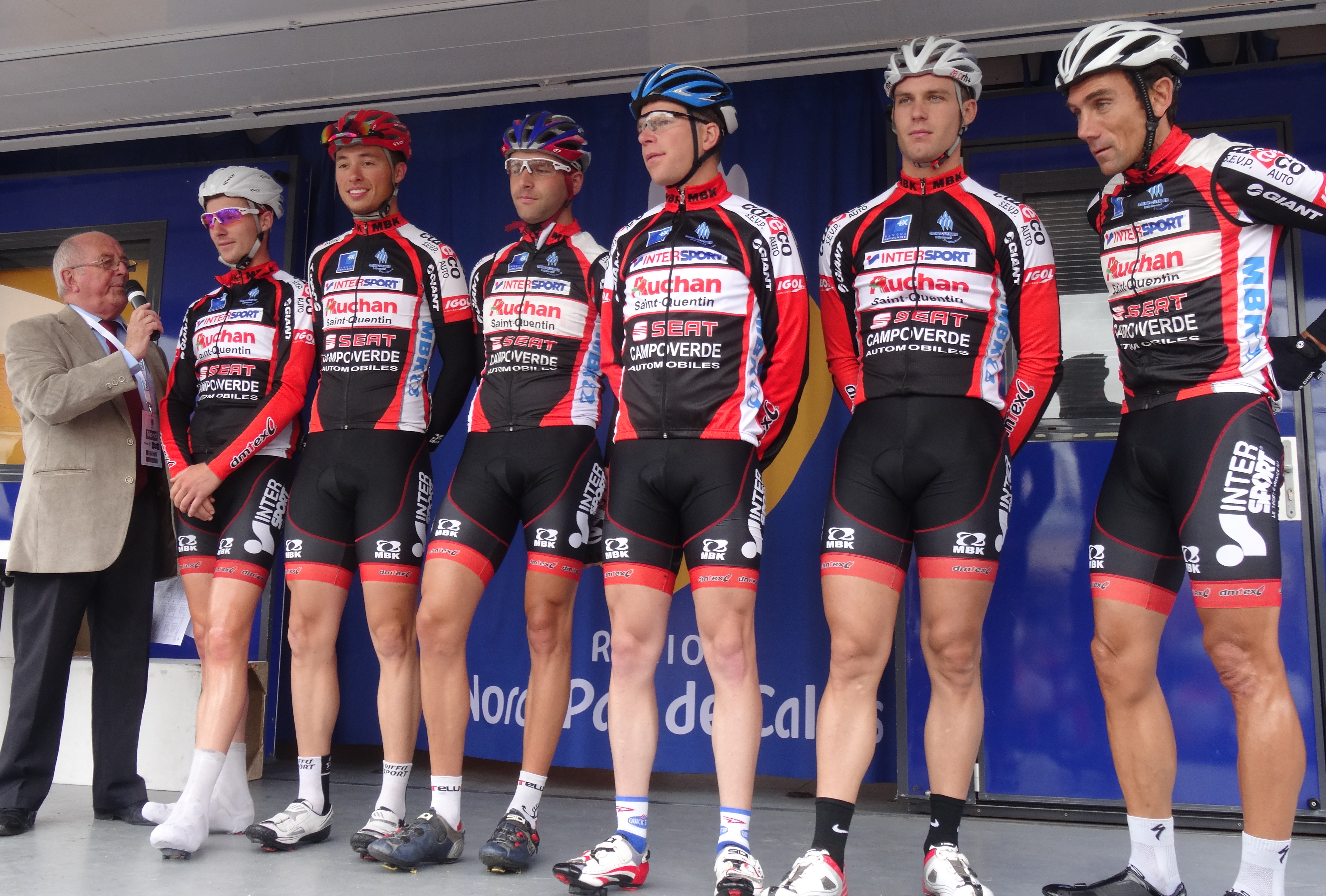 Reportage photographique réalisé le dimanche 13 juillet à l'occasion du départ et de l'arrivée de la Ronde pévéloise 2014 à Pont-à-Marcq, Nord-Pas-de-Calais, France.